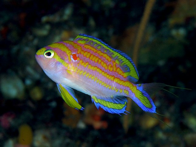 キシマハナダイ♂ Tosanoides flavofasciatus